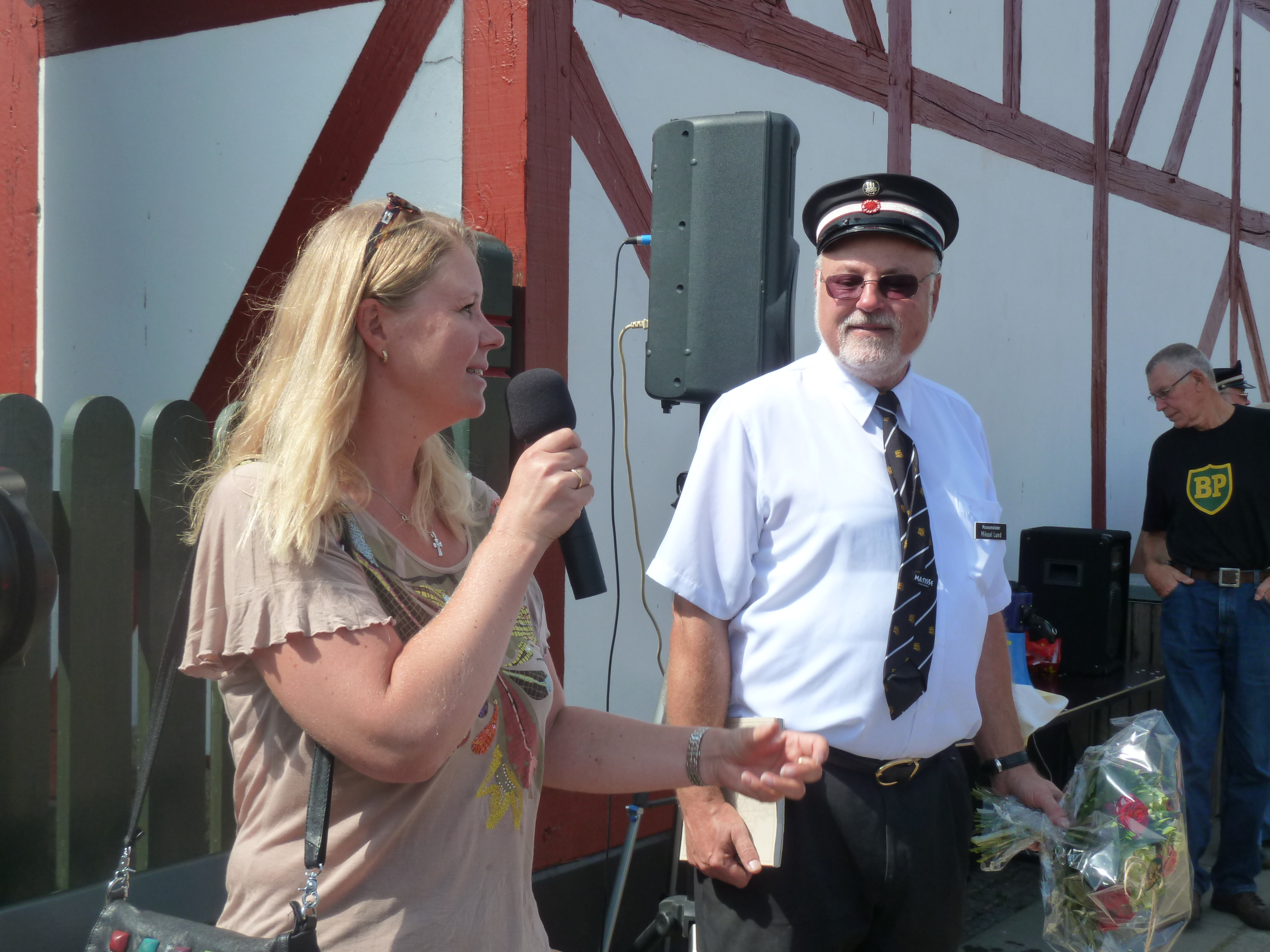 Copenhagen mayor of culture and recreation, Pia Allerslev, and chairman of Sporvejshistorisk Selskab, Mikael Lund, on Sporvejsmuseet Skjoldenæsholm.